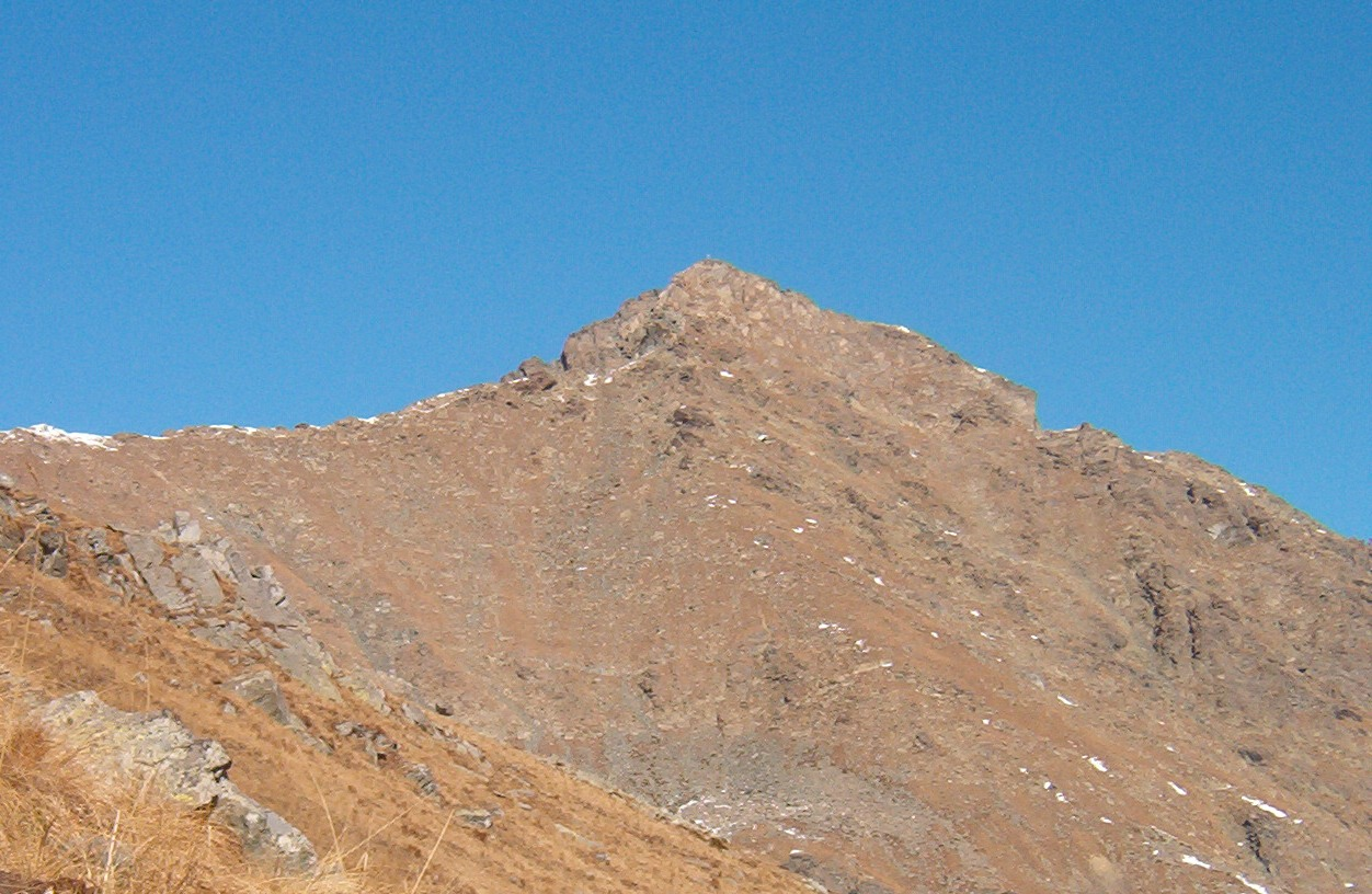 Punta Lunella - Piemonte - Alpi Graie - Italy